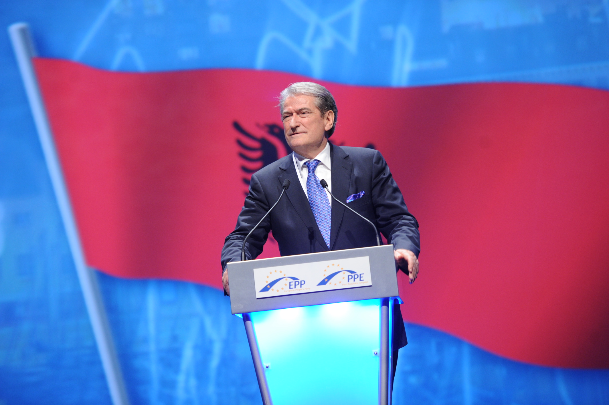 EPP Congress Marseille 6007